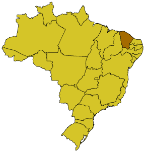 Karte Brasiliens, Ceará hervorgehoben, GFDL nach der Vorlage Bild:Brasilien Bundesstaaten.png